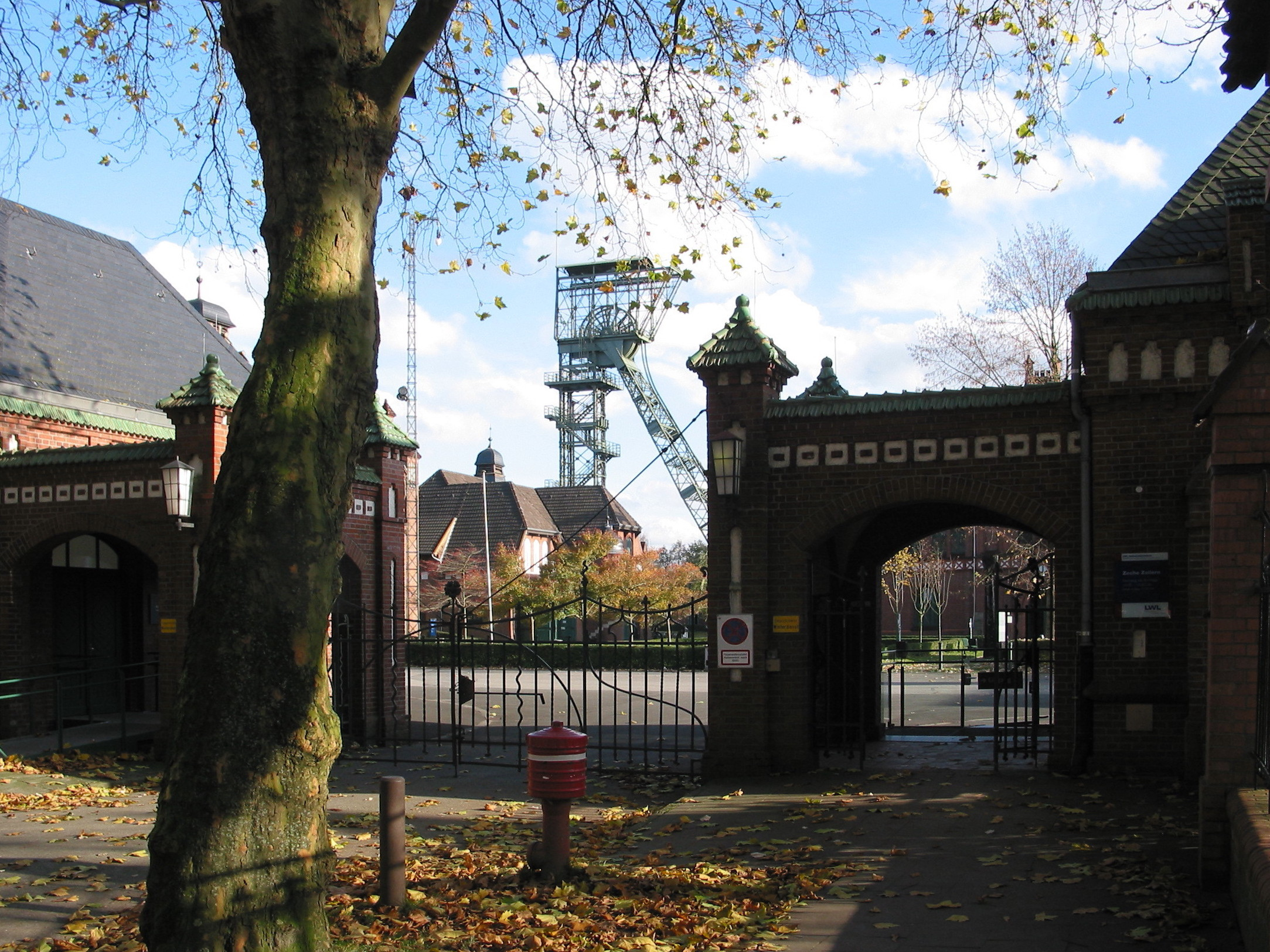 Industriemuseum Zeche Zollern (Eingang) This is a photograph of an architectural monument. 0373